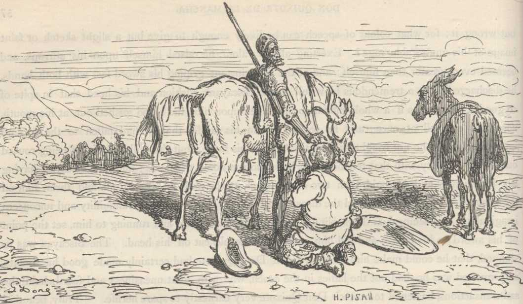 "Sancho Pança pede a Dom Quixote que lhe dê a ilha prometida" (1863), iIustração por Gustave Doré para “Don Quixote“ de Miguel de Cervantes.